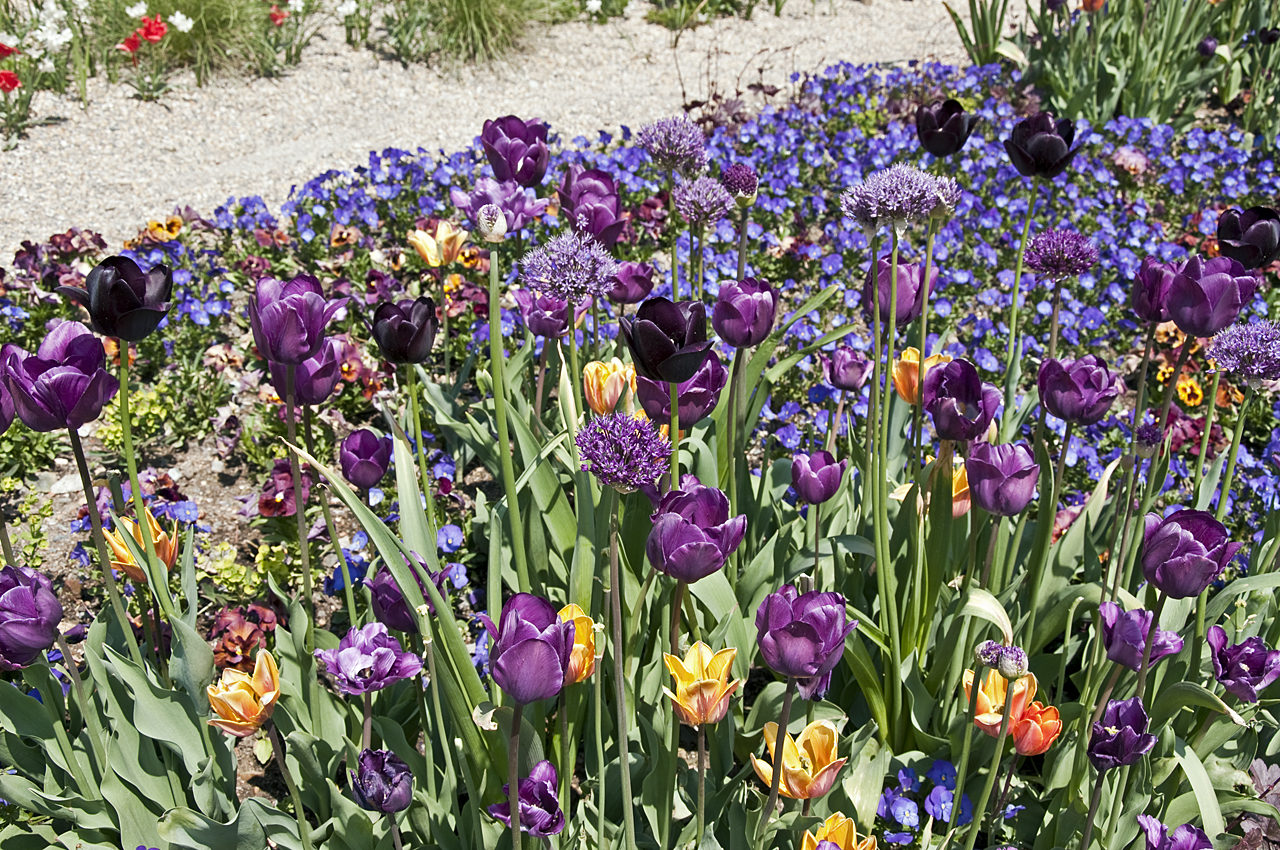 Landesgartenschau 2009 in Reichenbach im Vogtland